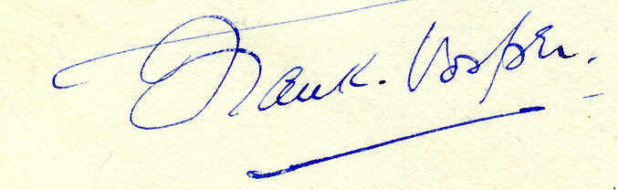 Unterschrift von Frank Permian Vosper (1899–1937), britischer Schauspieler und Bühnenautor